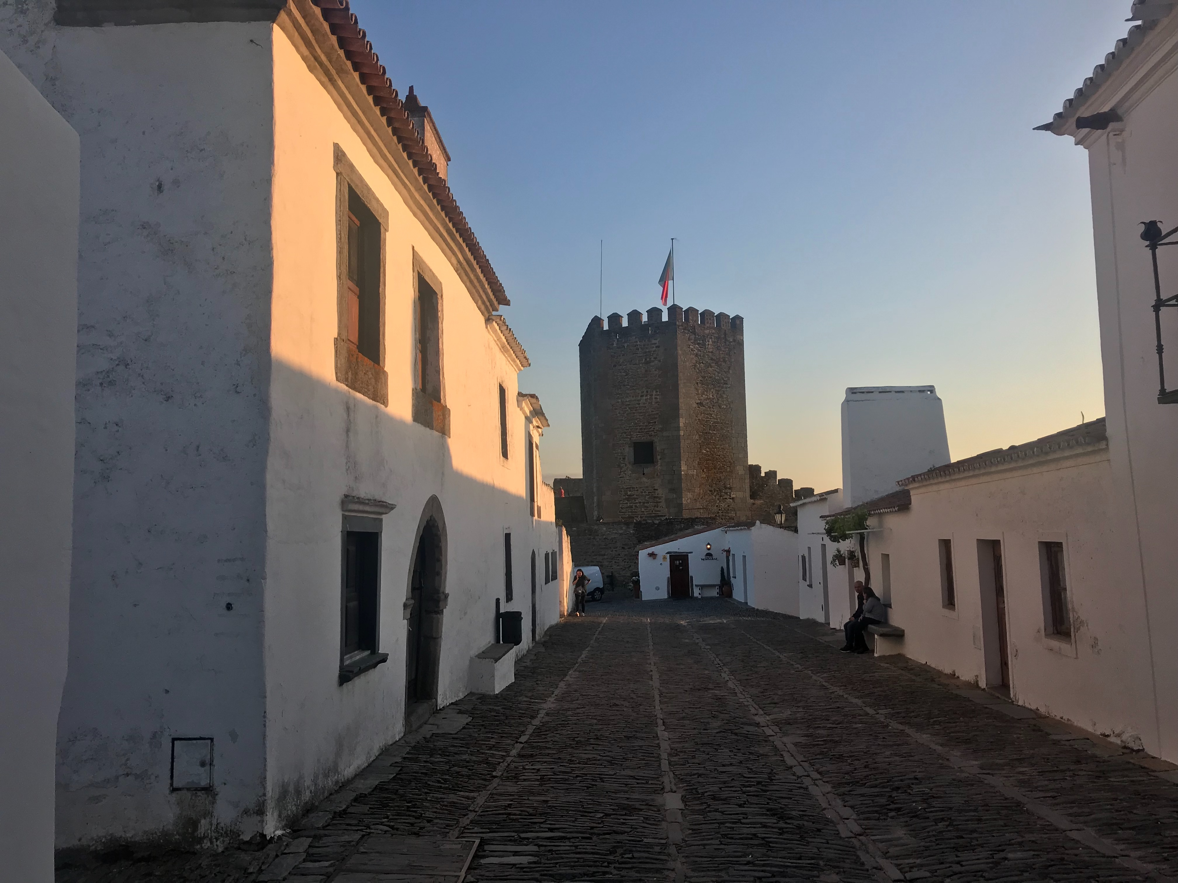 Monsaraz, Portugal, May 2018